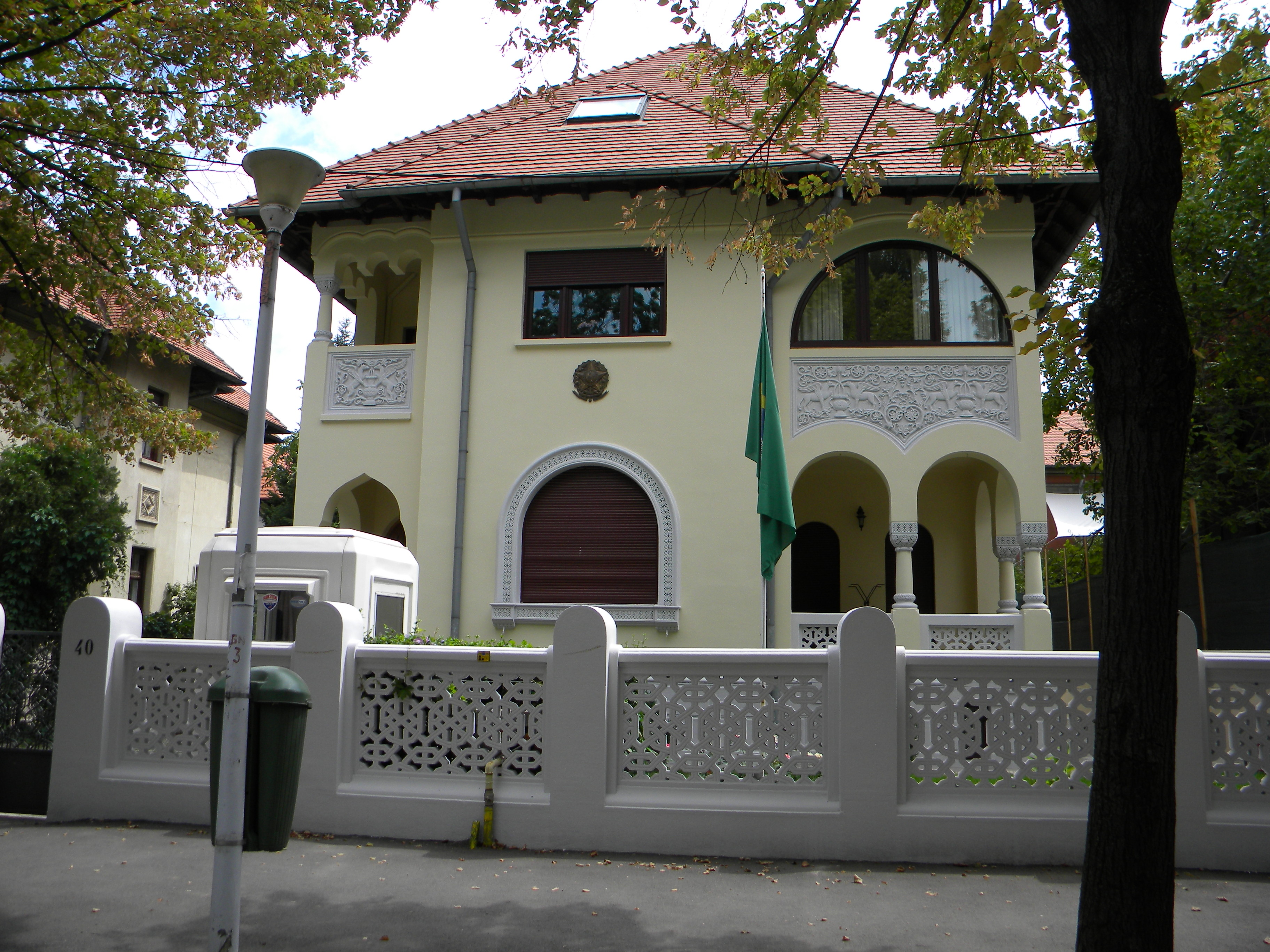 Imobil pe Bd. Aviatorilor, nr. 40, Bucuresti sect. 1